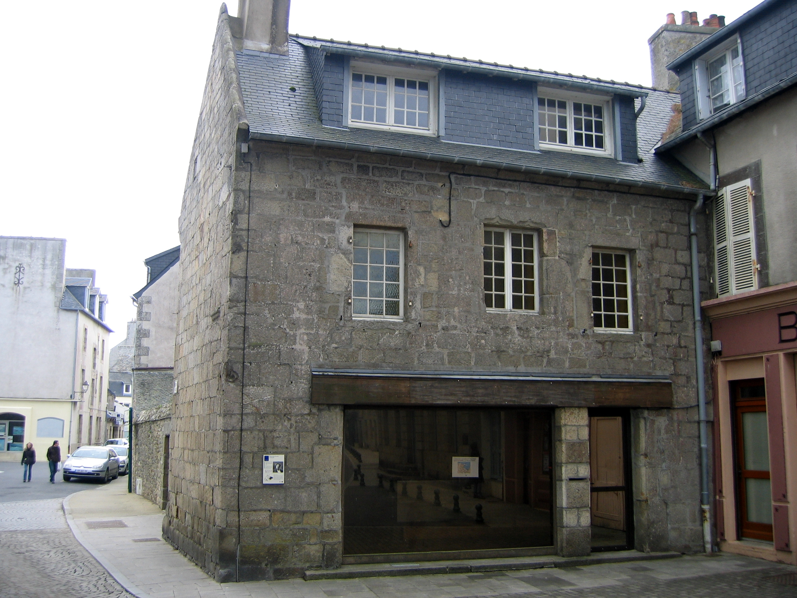 Maison où résida Alexandre Dumas lors de son séjour à Roscoff pendant l'été 1869